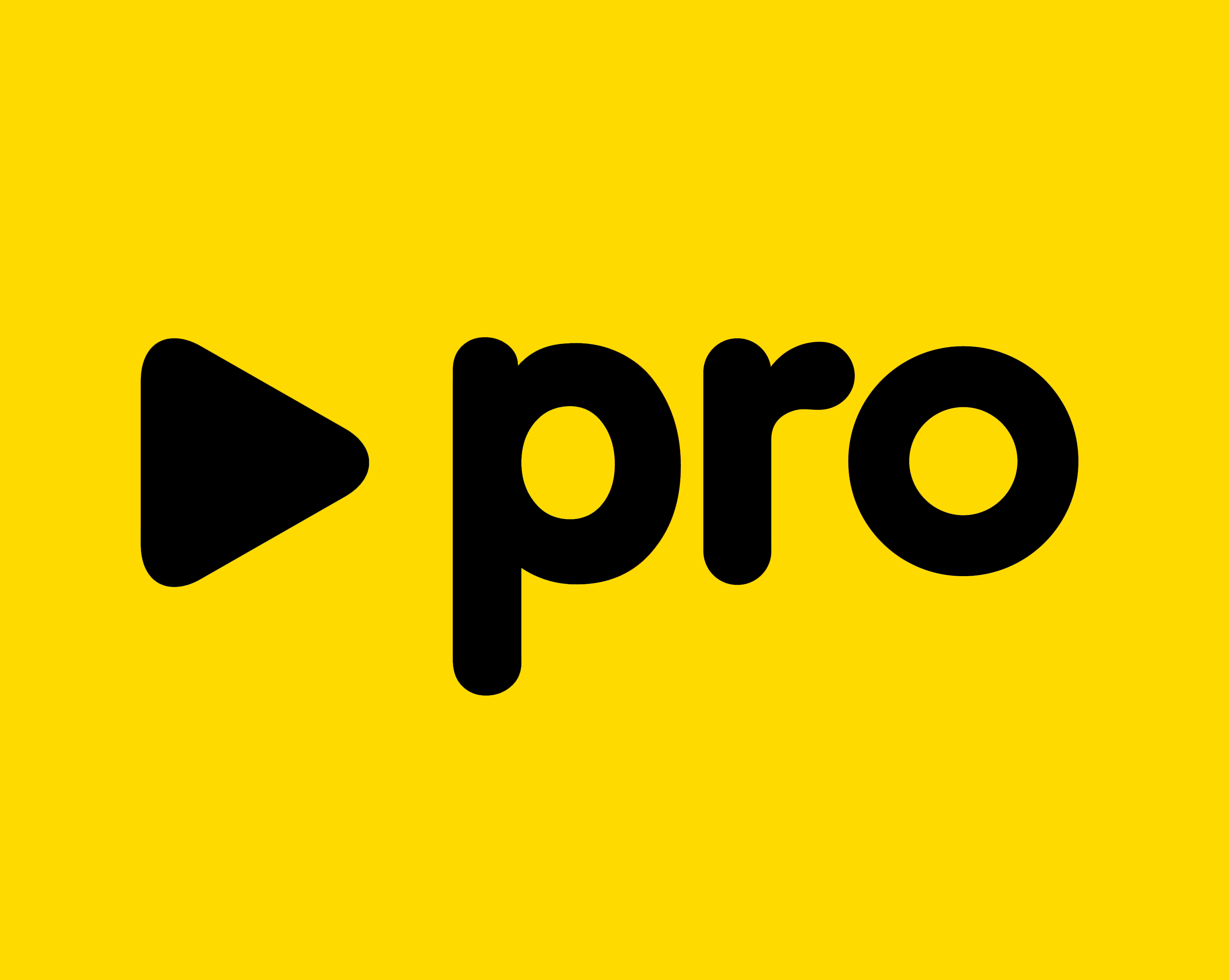 Emblema del partido político argentino Propuesta Republicana